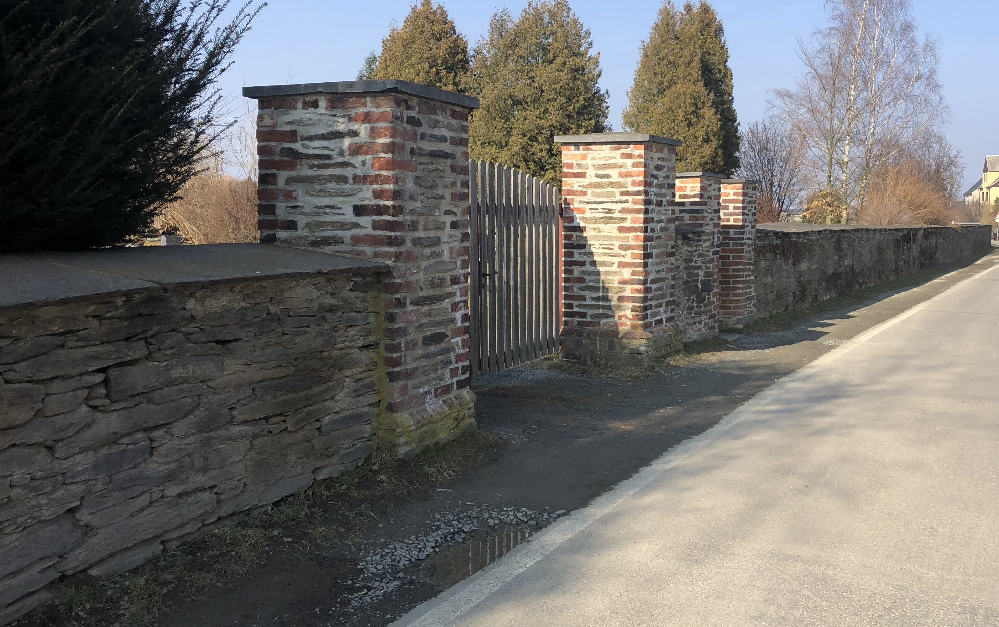 Friedhofsmauer in Theuma aus südlicher Richtung am 25.3.2018